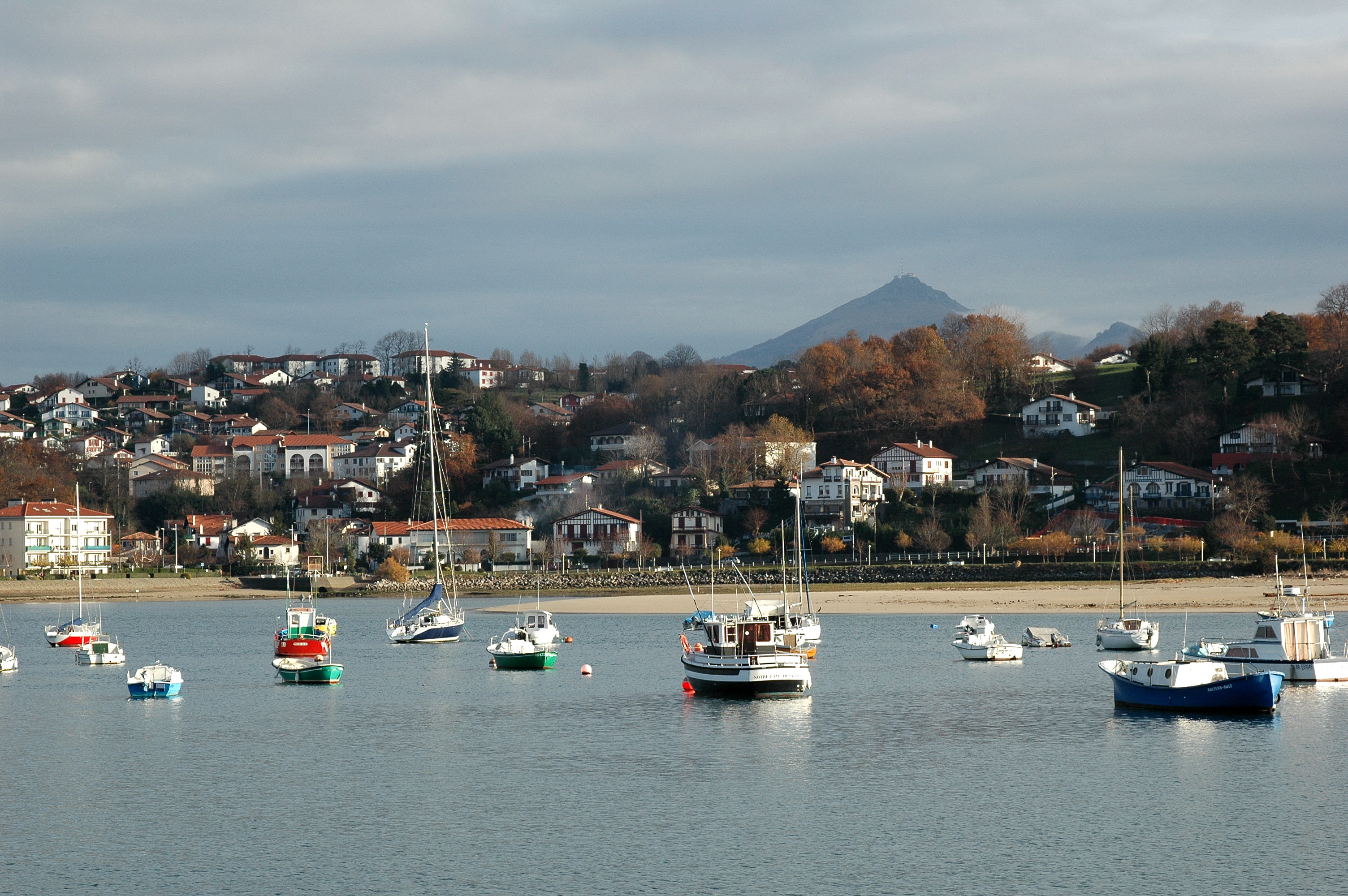 Hendaye, le port de plaisance et la Rhune. Photo prise le 06/01/07 par Harrieta171